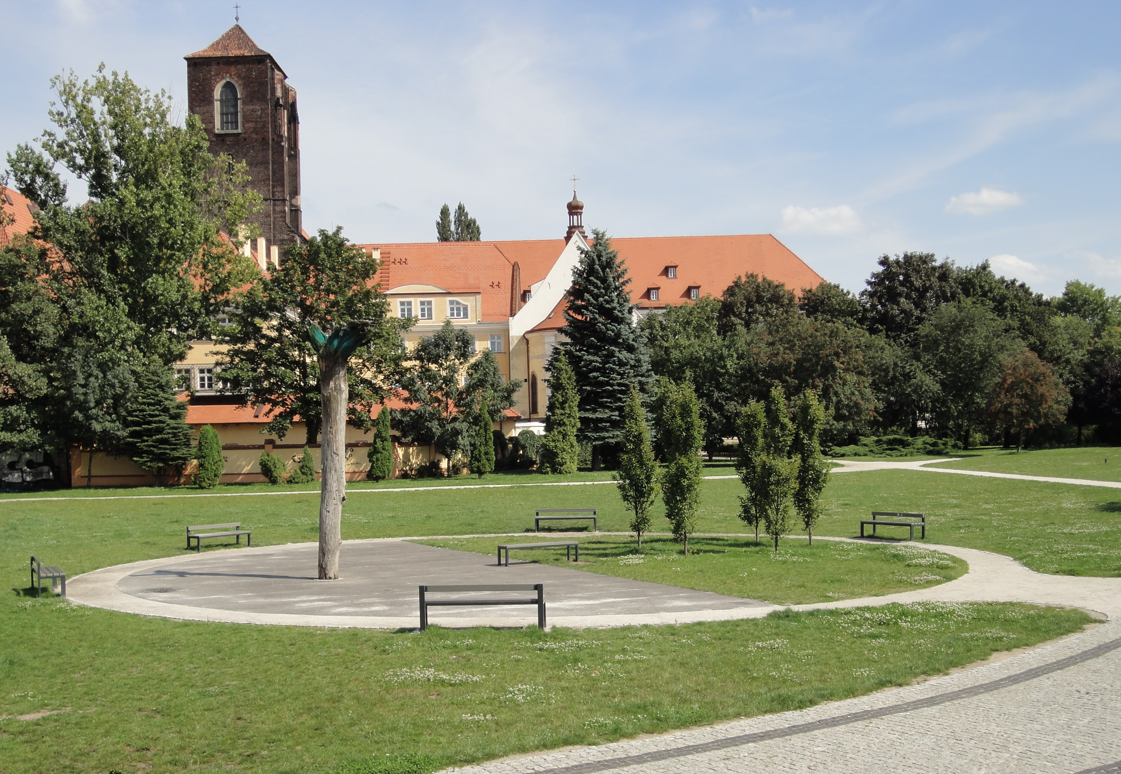 Wrocław, Wyspa Piaskowa - Żywy Pomnik "ARENA"; rzeźba plenerowa autorstwa Jerzego Beresia